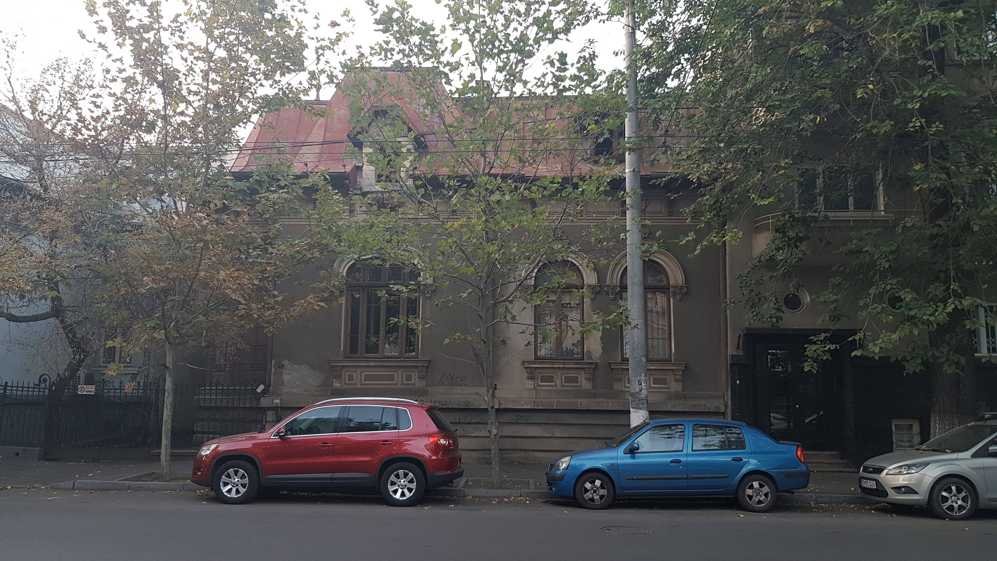 Casa Flechtenmacher